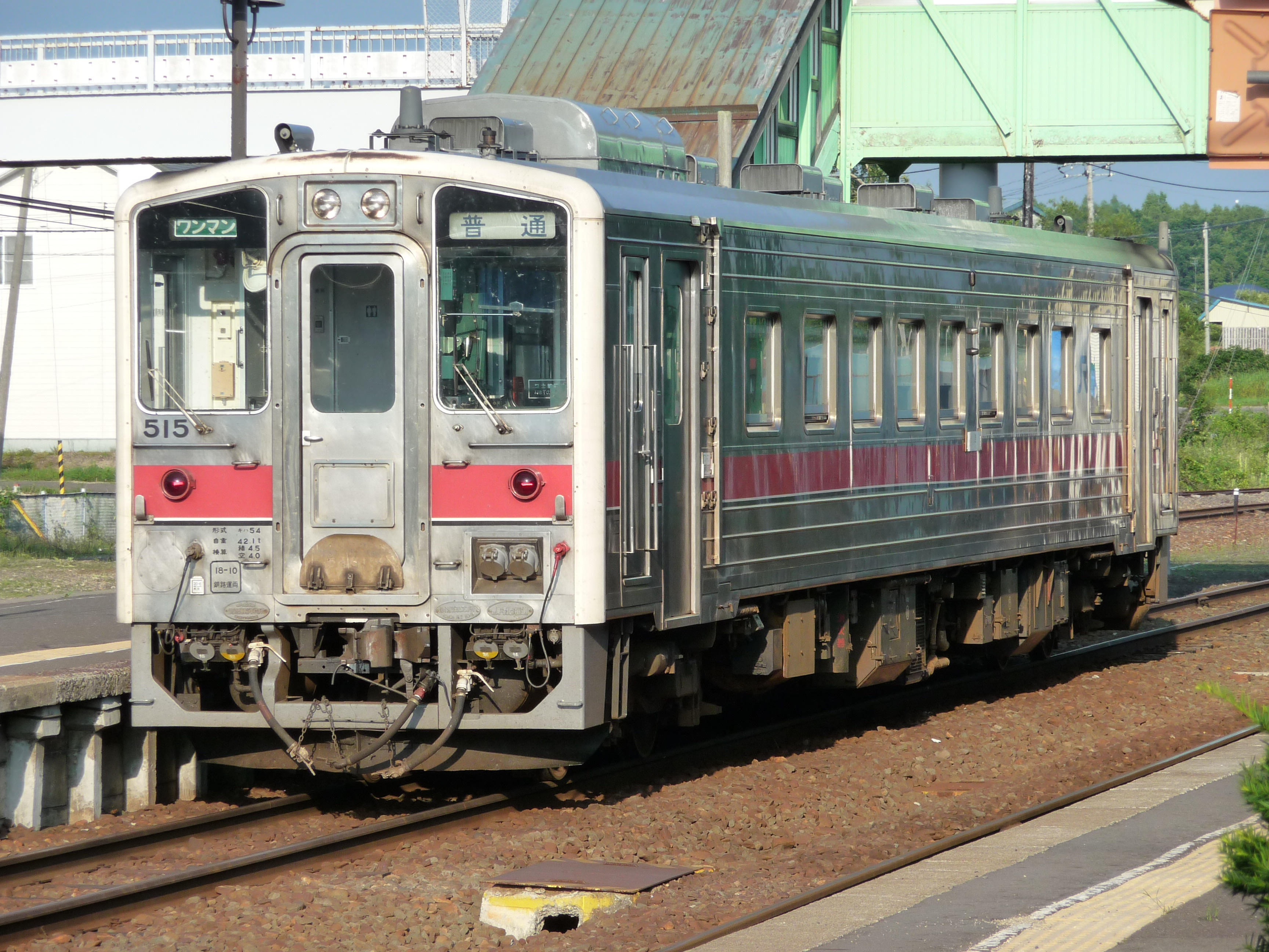 JR北海道キハ54形気動車（キハ54 515）JR北海道釧網本線、摩周駅にて